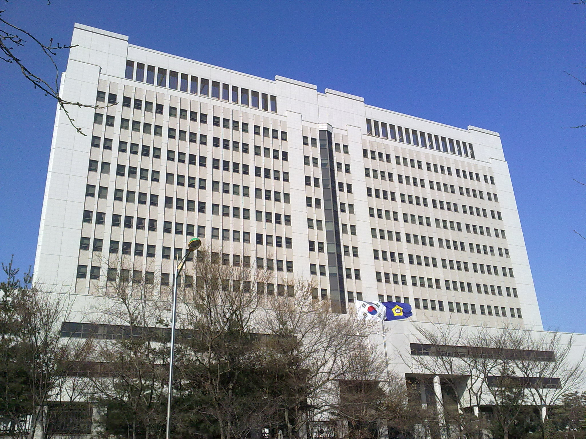 인천지방법원